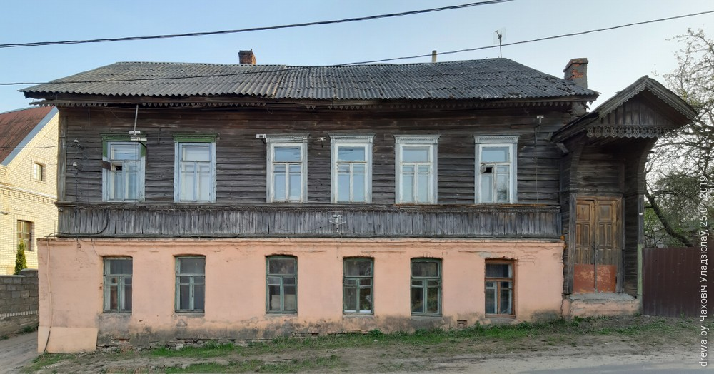 Магілёў, вул. Свярдлова, 24